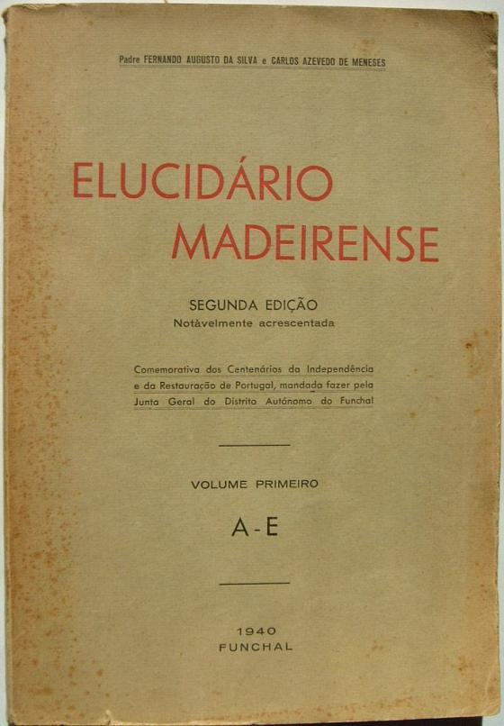 Padre Fernando Augusto da Silva e Carlos de Azevedo Meneses, Elucidário Madeirense, 2.ª edição notavelmente aumentada, 3 vols., Funchal, 1940.